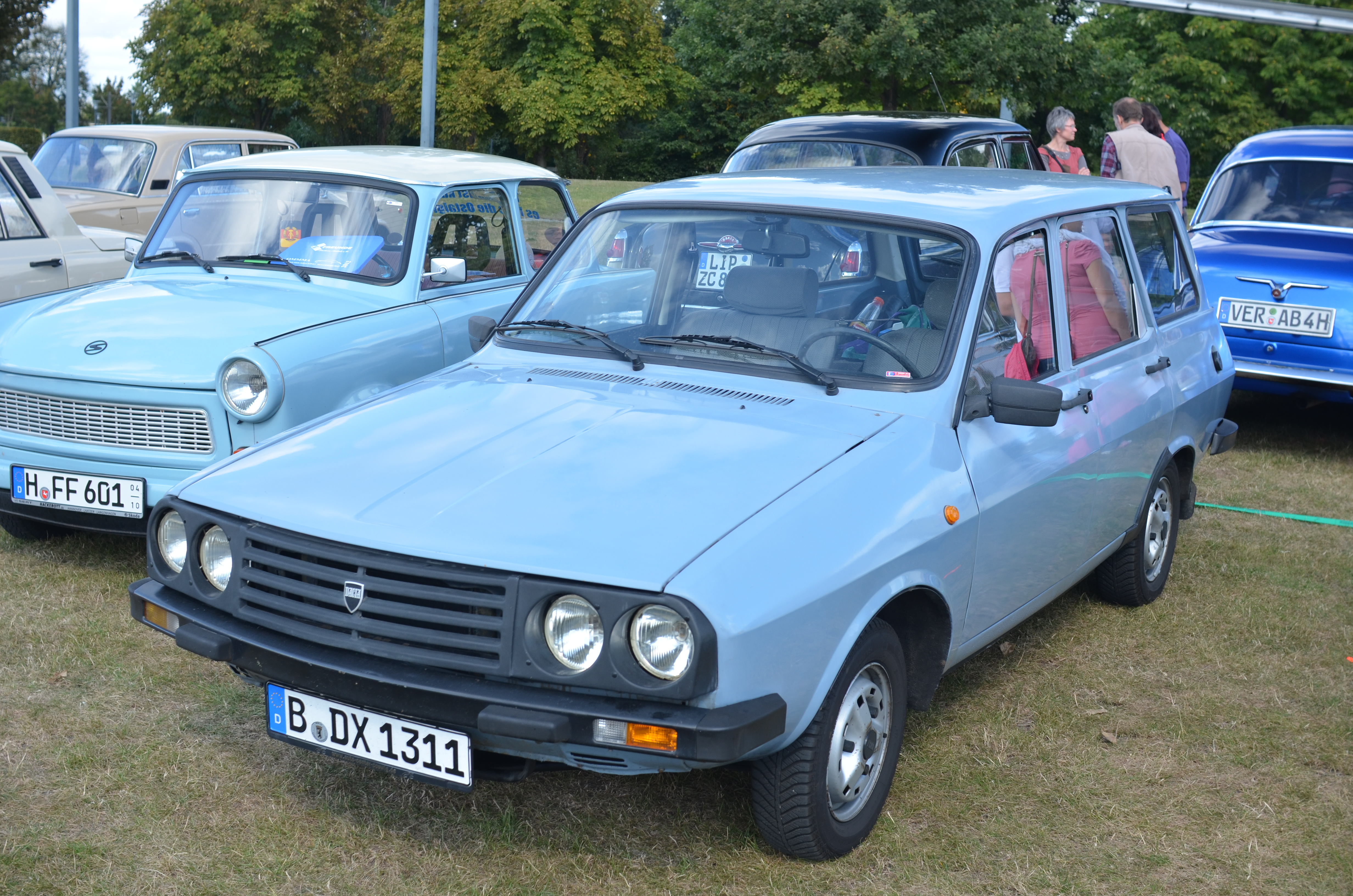 Dacia